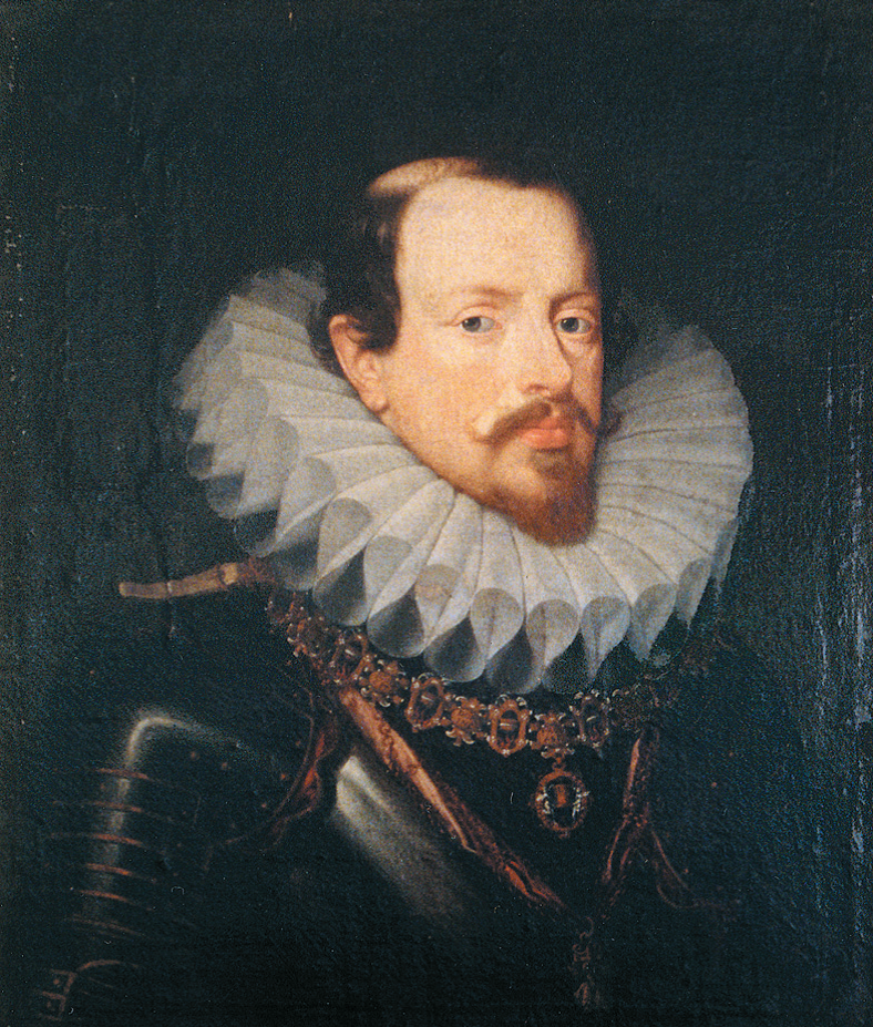 Vincenzo Gonzaga a mezzo busto con le onorificenze del Toson d’Oro e del Redentore.